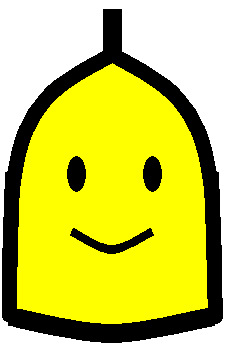 大韓民國首爾特別市鍾路區新區徽，由石添小草 04:25 2005年8月10日 (UTC)於04:25 2005年8月10日 (UTC)製作。源文件：